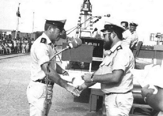 טקס השקת אח"י קשת במספנות ישראל. מפקד הספינה סא"ל אלי רהב מקבל ברכת הדרך מהרב החילי.